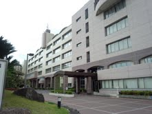 大阪市にある私立明星高校の校舎の様子